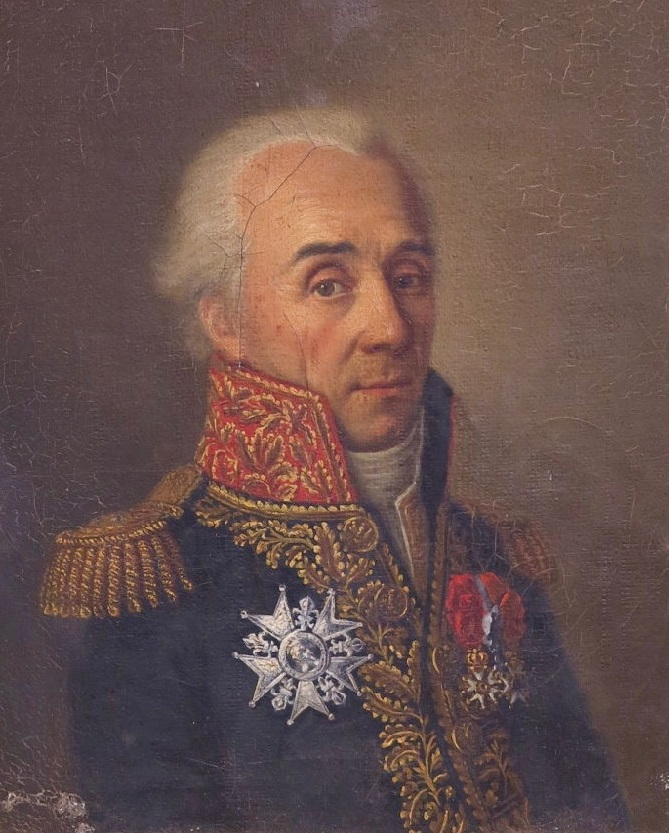 Louis François Jean Chabot (1757-1837), général de division et baron de l'Empire.